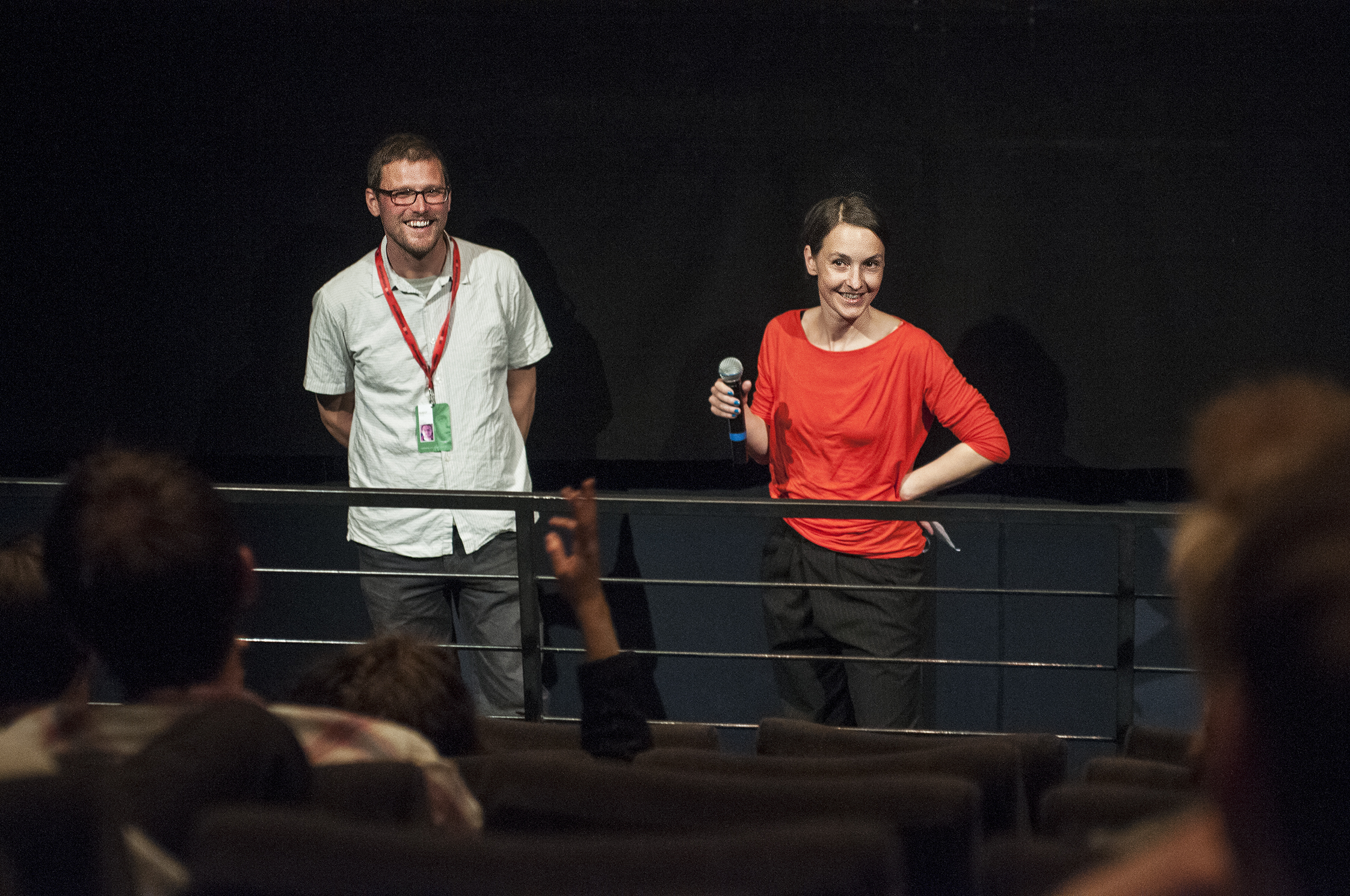 photos by: Kaja Maslowski //